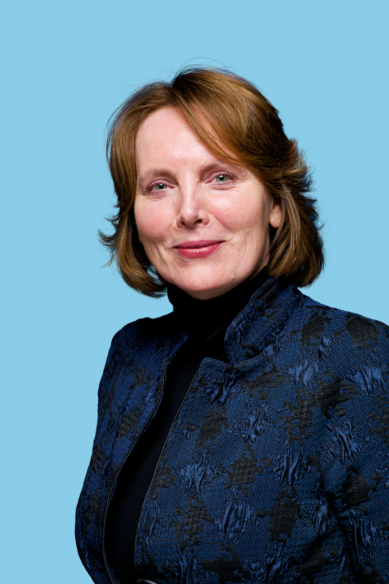 18 januari 2015. Kandidaat voor de Eerste Kamer. Op pvda.nl de volledige kandidatenlijst: bit.ly/1zpNRIG. Foto Lex Draijer.